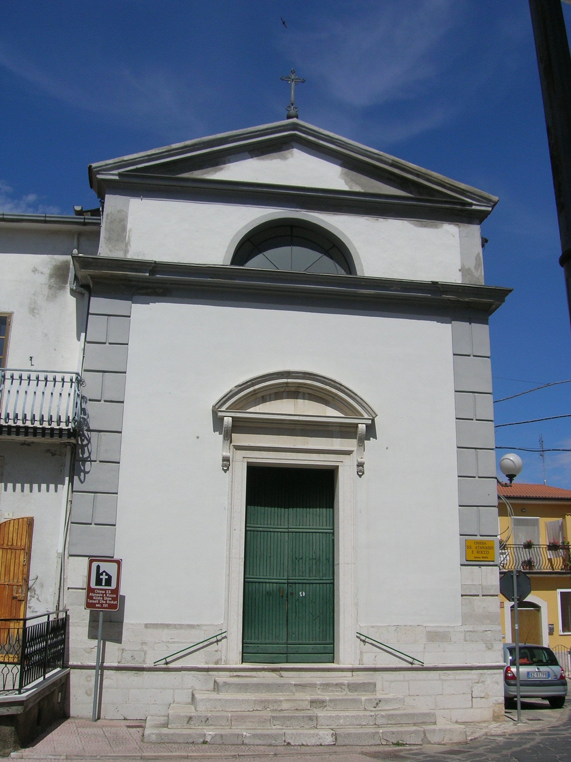 Chiesa di Sant'Attanasio e San Rocco, Barile (PZ)